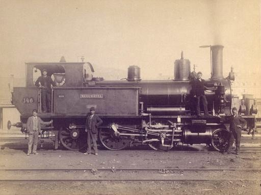 Dampflokomotive Ec 3/4 Nr. 146 „Neuchâtel“ der Jura neuchâtelois in La Chaux-de-Fonds, erbaut 1886 von der Schweizerischen Lokomotiv- und Maschinenfabrik (SLM) in Winterthur, 1903 unbenannt in „Le Père Fritz“, 1913 als Nr. 6551 an die SBB, 1935 ausrangiert